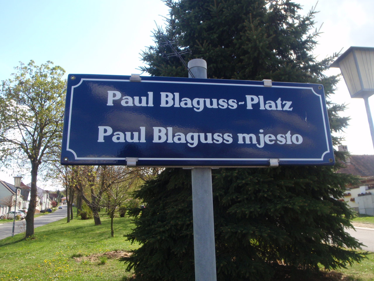 Paul Blaguss Platz Alsópulyán